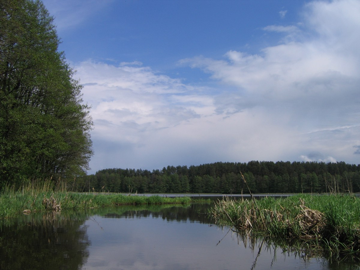 Autoriaus nuotrauka, 2006.05.20. Varėnė įteka į Varėnį. Nuotrauka gali būti platinama pagal GFDL licenciją.